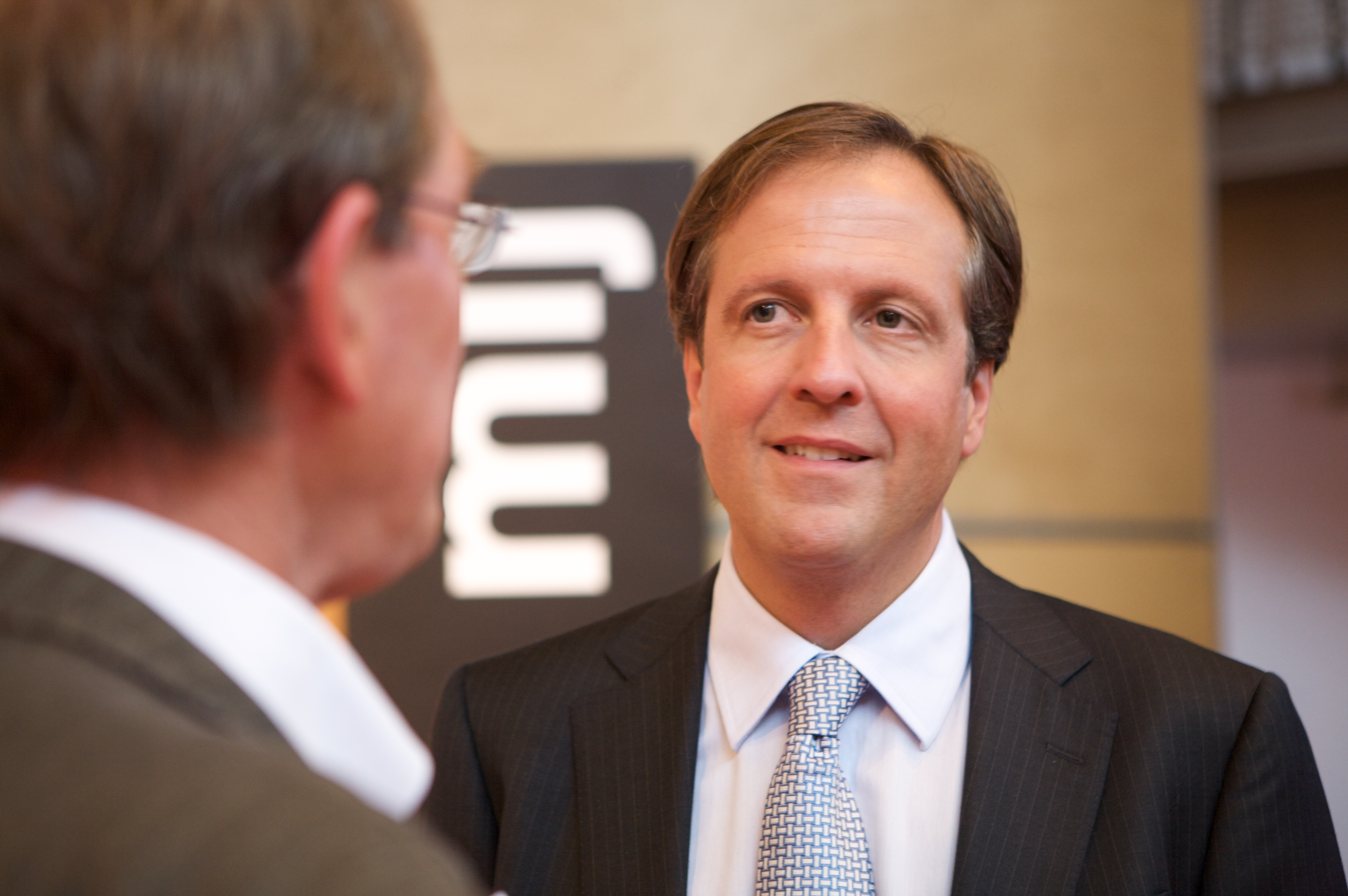 D66 congres 07-11-09 Breda